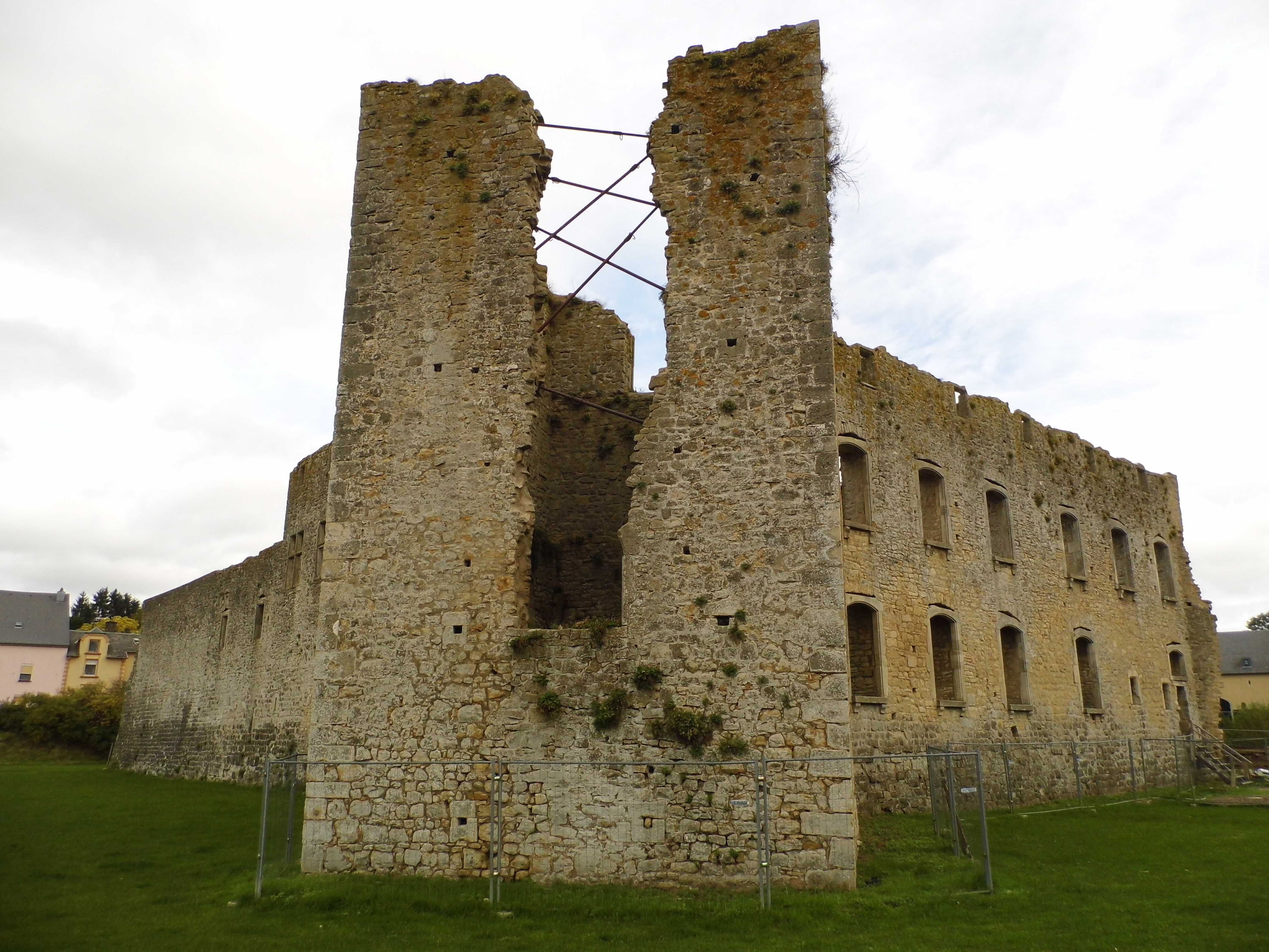 Käercher Buerg, mam Ecktuerm vir am Bild